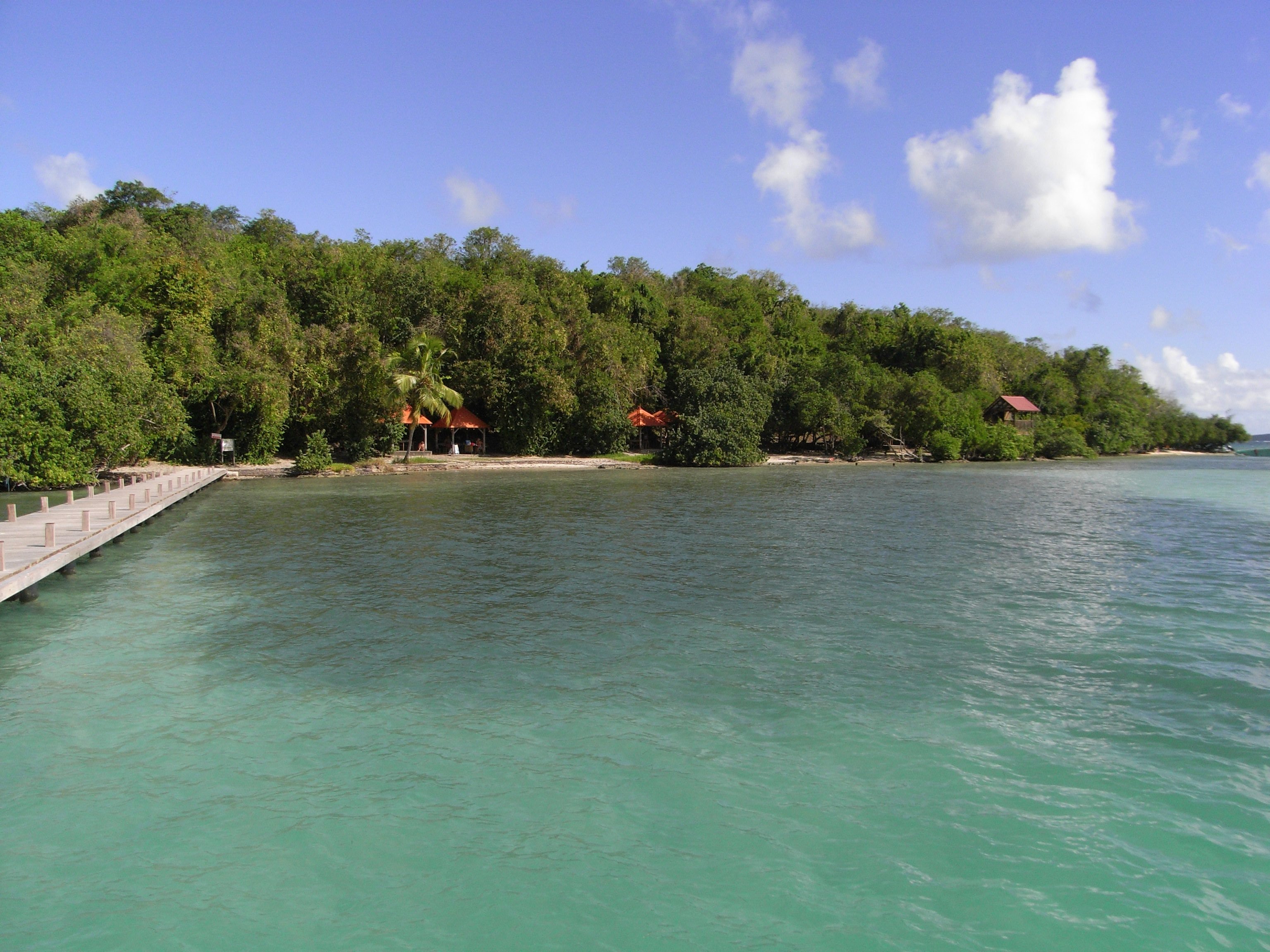 L'Îlet Madame situé dans le Havre du Robert en Martinique (France).